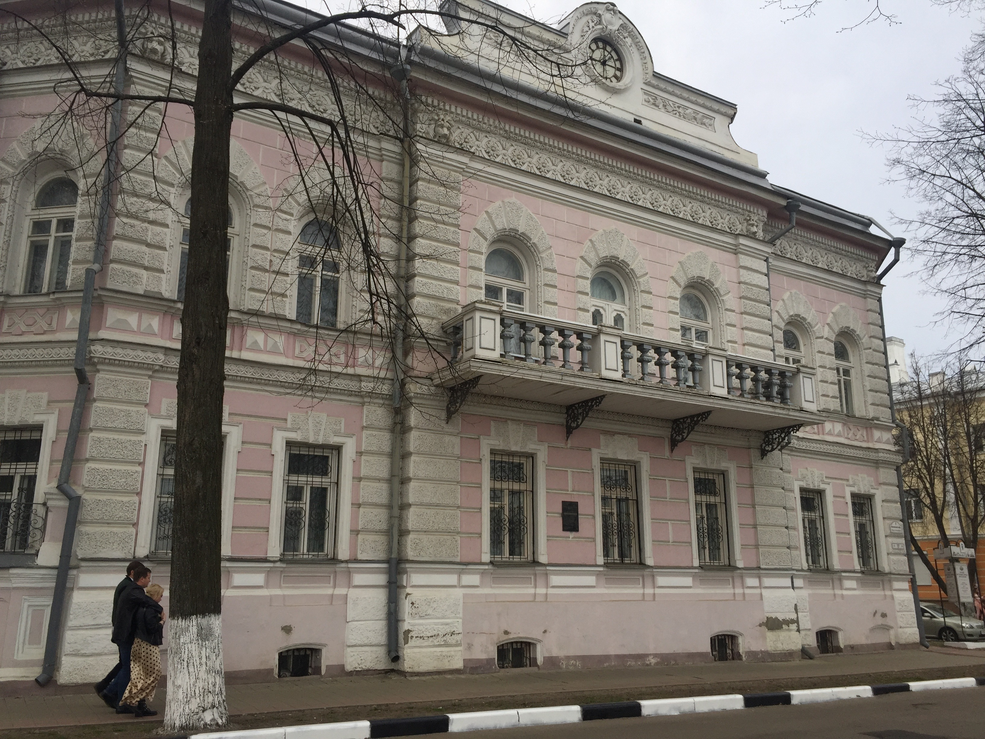 Волжская набережная